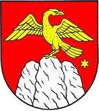 Erb obce Hrišovce Erb obce Hrišovce